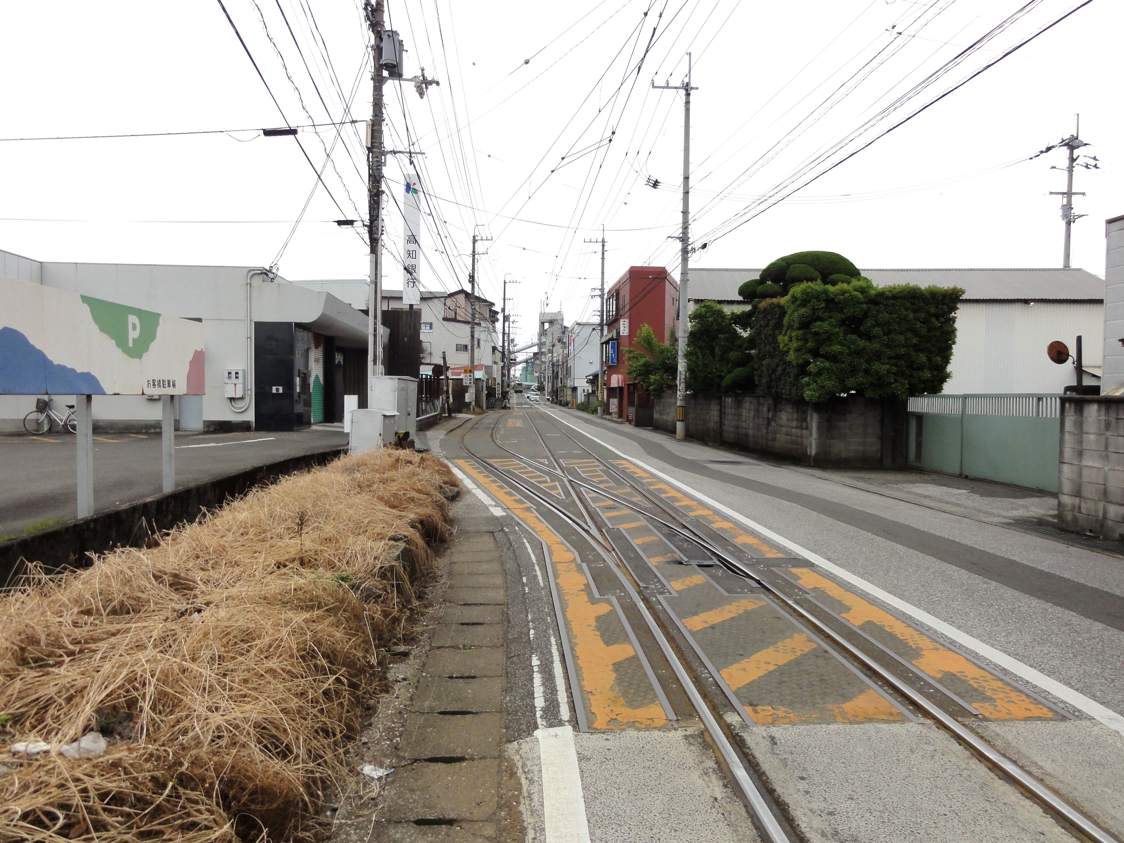 土佐電気鉄道市場前信号所。